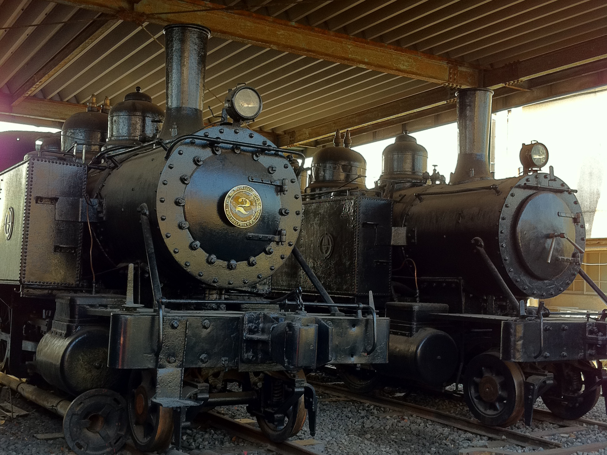 小湊鉄道で保存されている2両の国鉄3030形